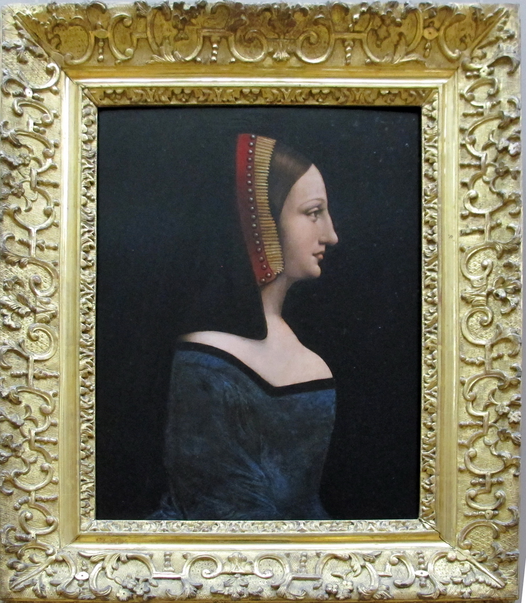 Pittura italiana del Cinquecento, Louvre